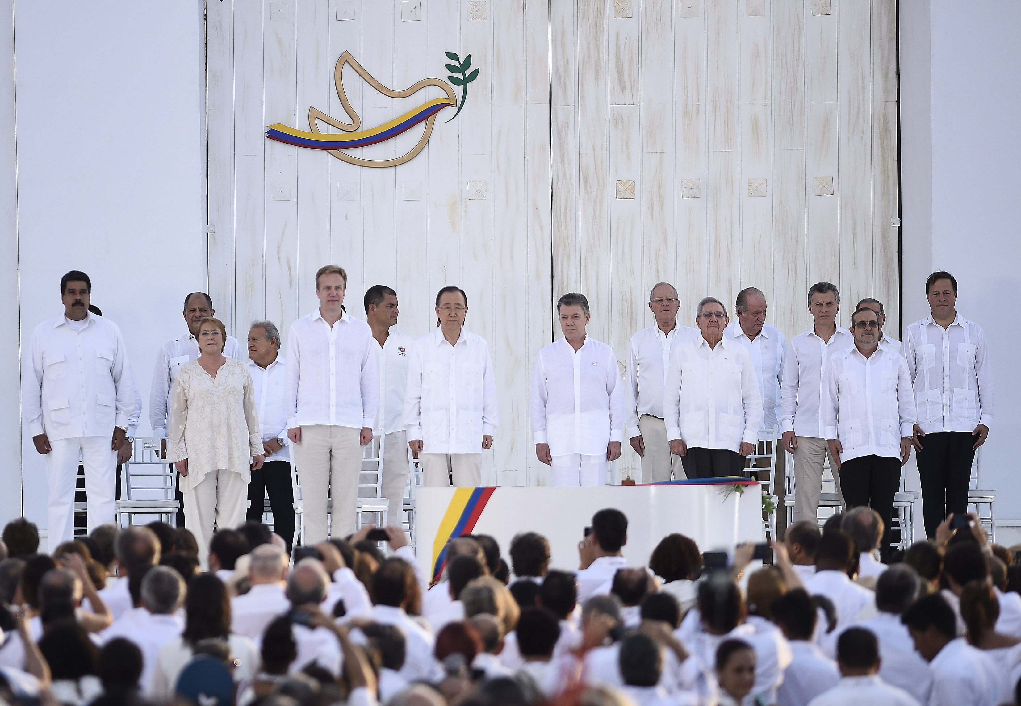 Gobierno de Chile